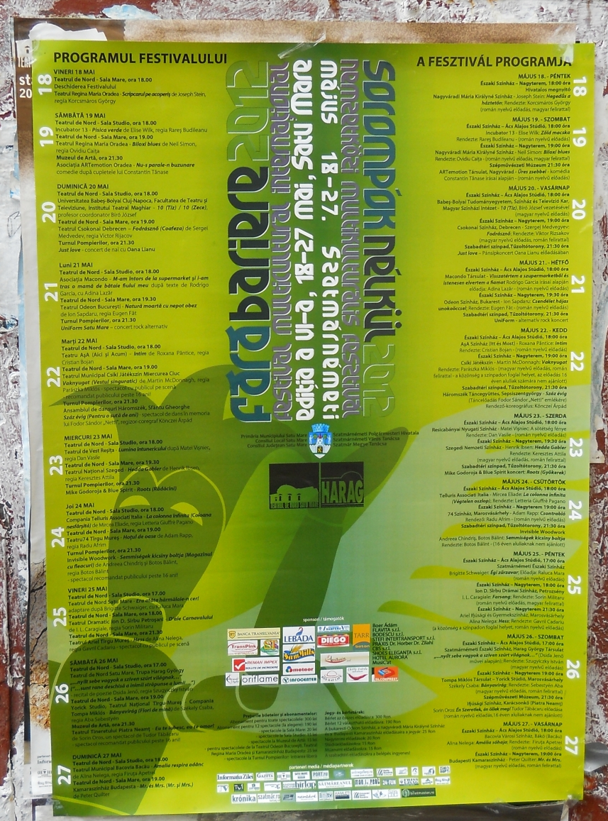 A 2012-es Sorompók Nélkül Nemzetközi Multikulturális Fesztivál köztéri plakátja